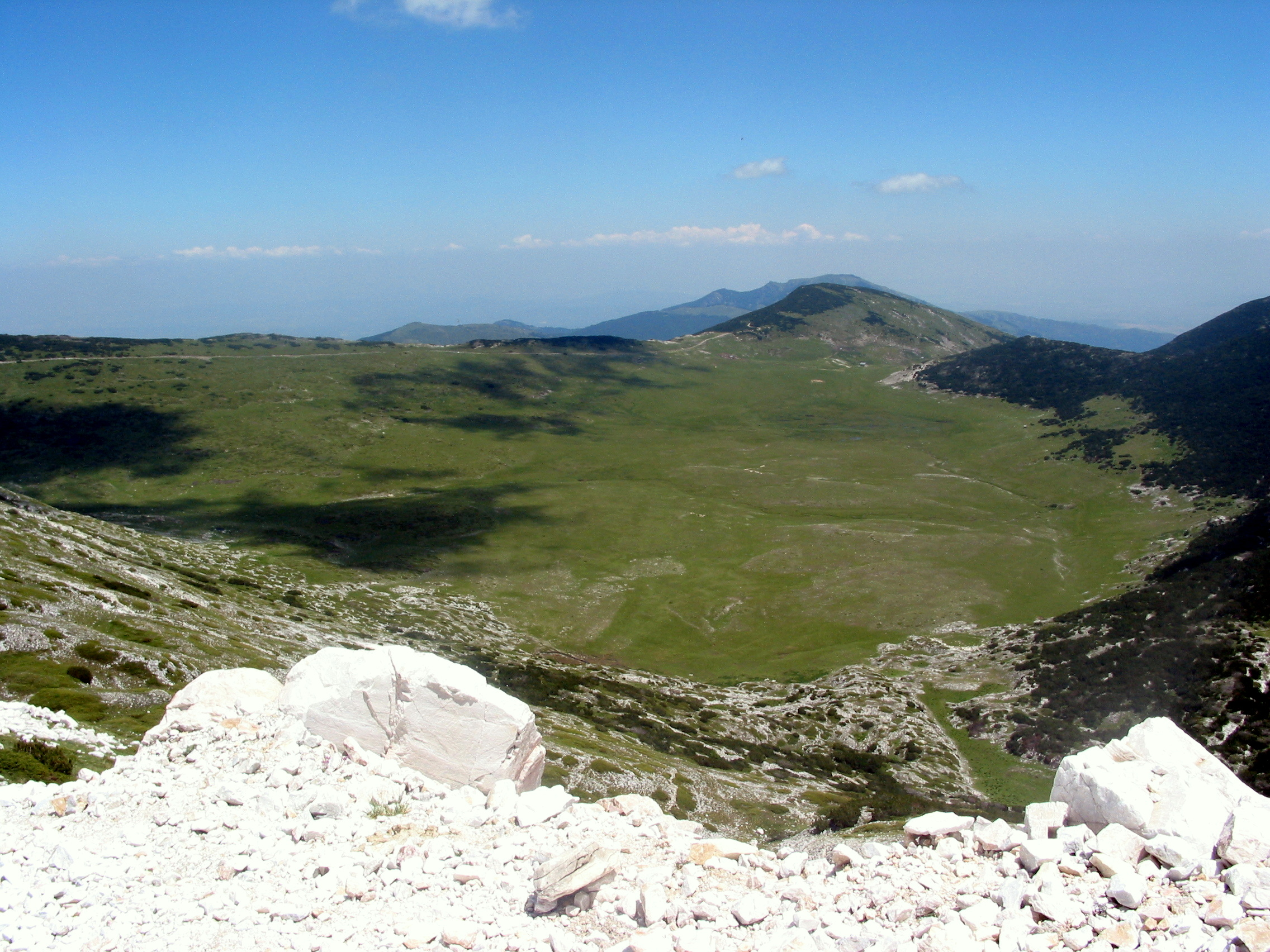 Поглед од Солунска Глава кон Бегово Поле